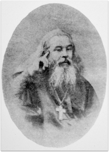 Герасим Алексеевич Никитников (1812—1884) — протоиерей Русской православной церкви, магистр богословия, профессор Вятской духовной семинарии и духовный писатель.